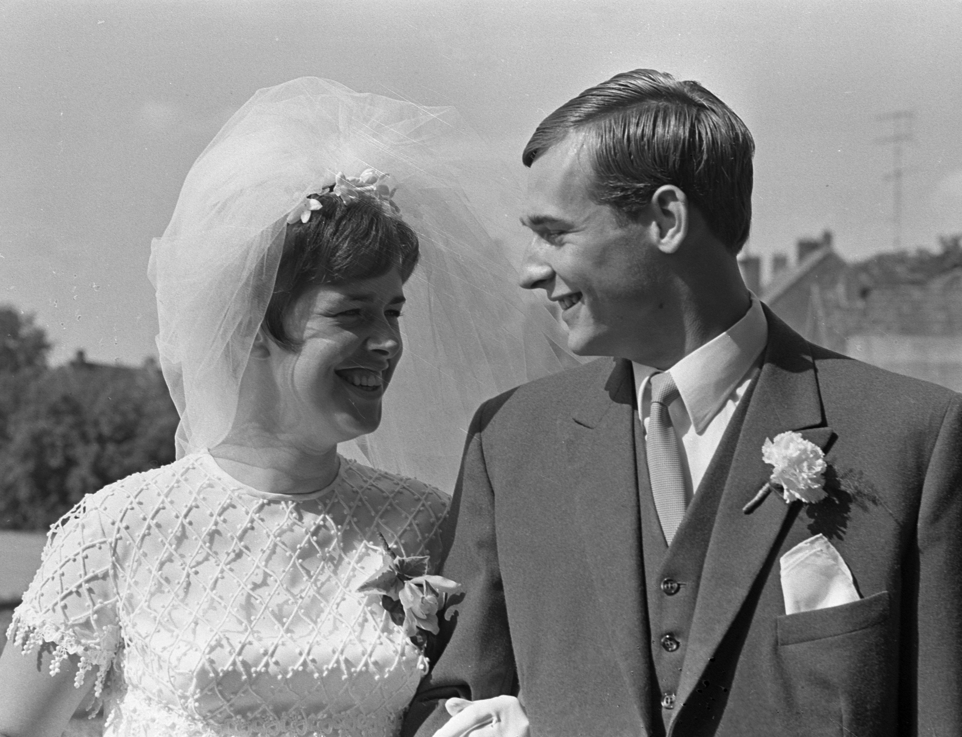 Keeper Jan van Beveren, gehuwd met Petra Warringa